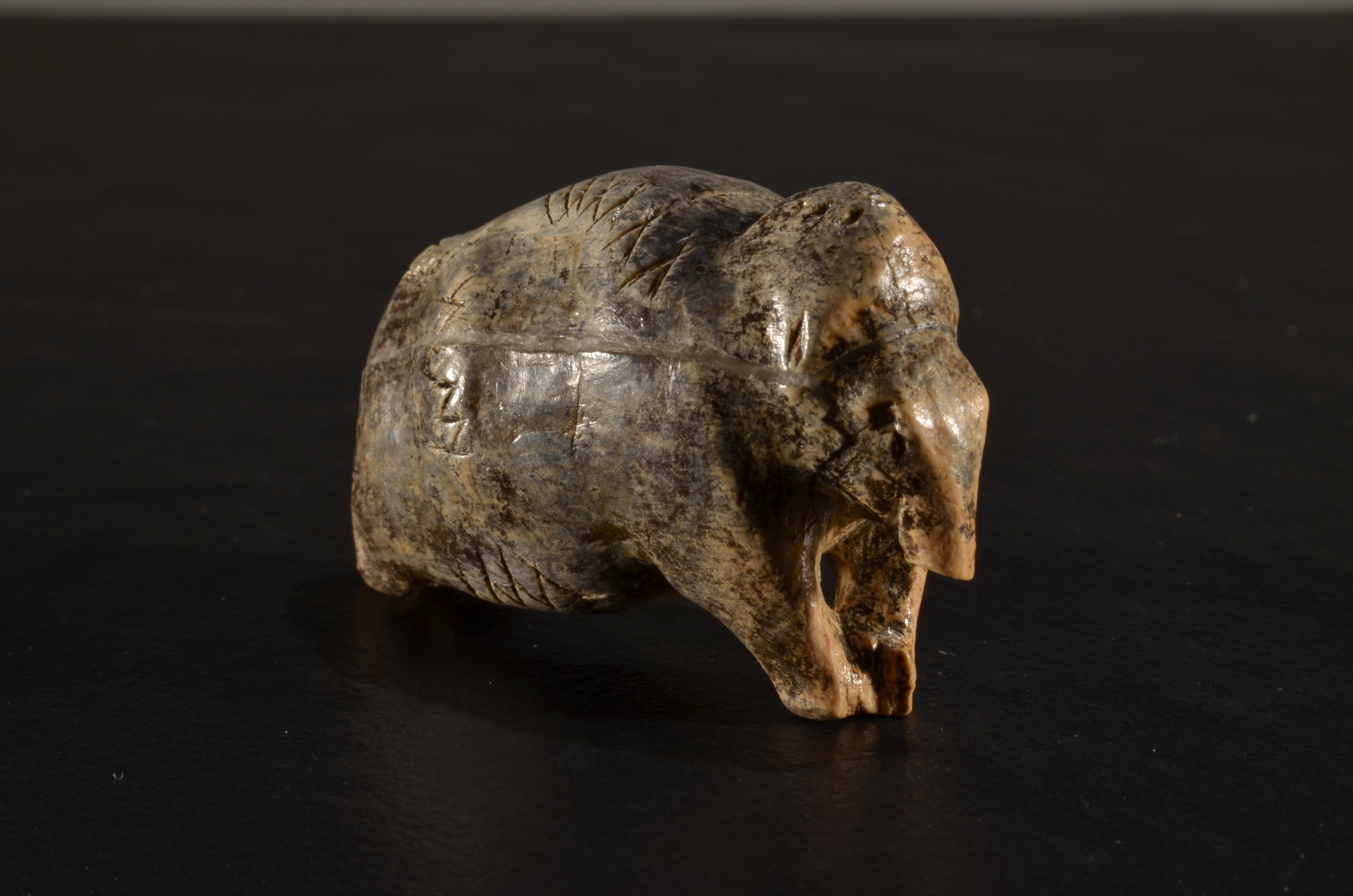 mammmummm